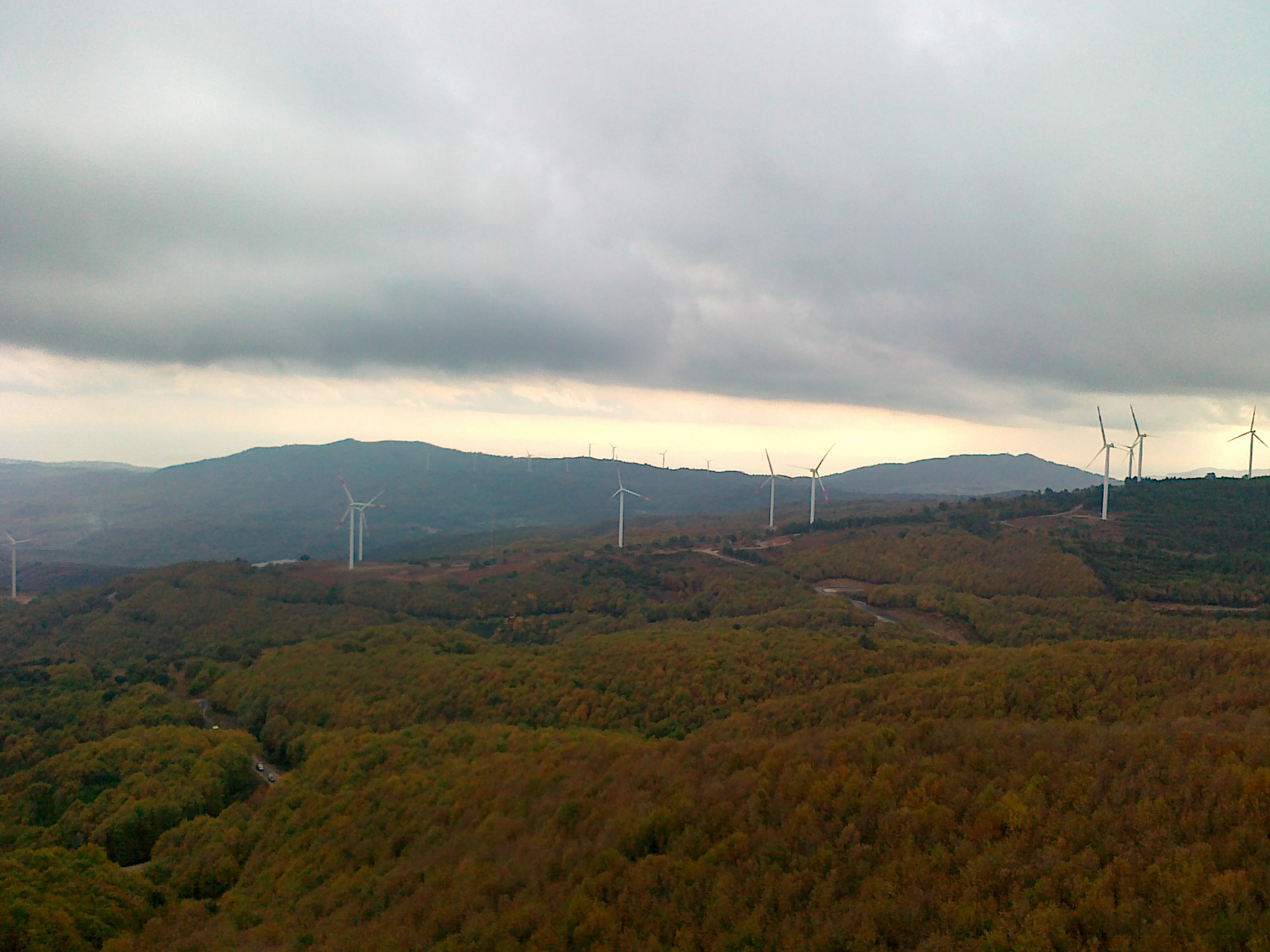 காற்றாலைகள்